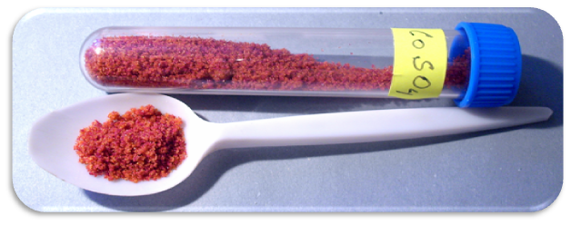 Síran kobaltnatý - CoSO4